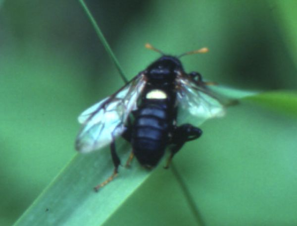 Keulhornblattwespe (Cimbex sp., vielleicht Cimbex femoratus), Keulhornblattwespen (Cimbicidae) - Österreich: Steiermark, Ennstal, Mündung des Leistenbachs, östlich von Stainach